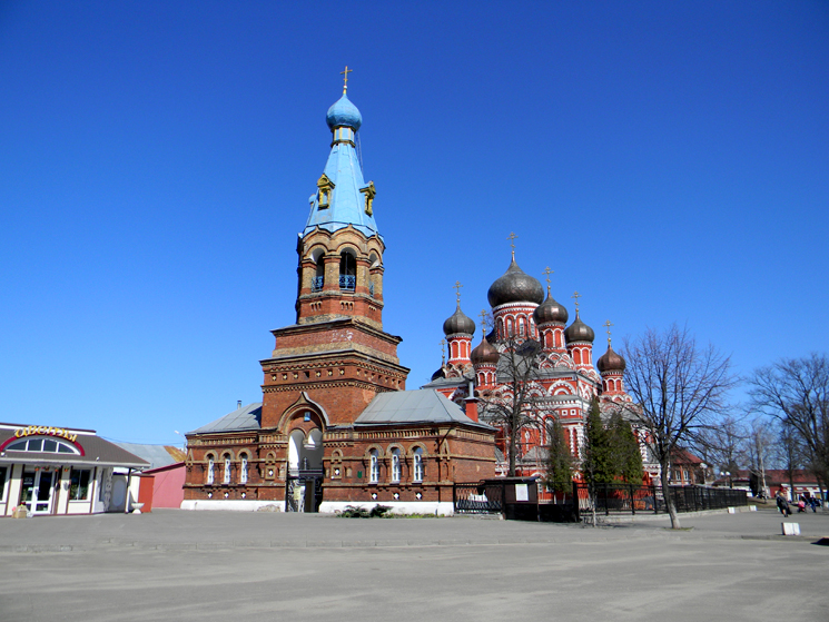 Барысаўскі Васкрасенскі сабор